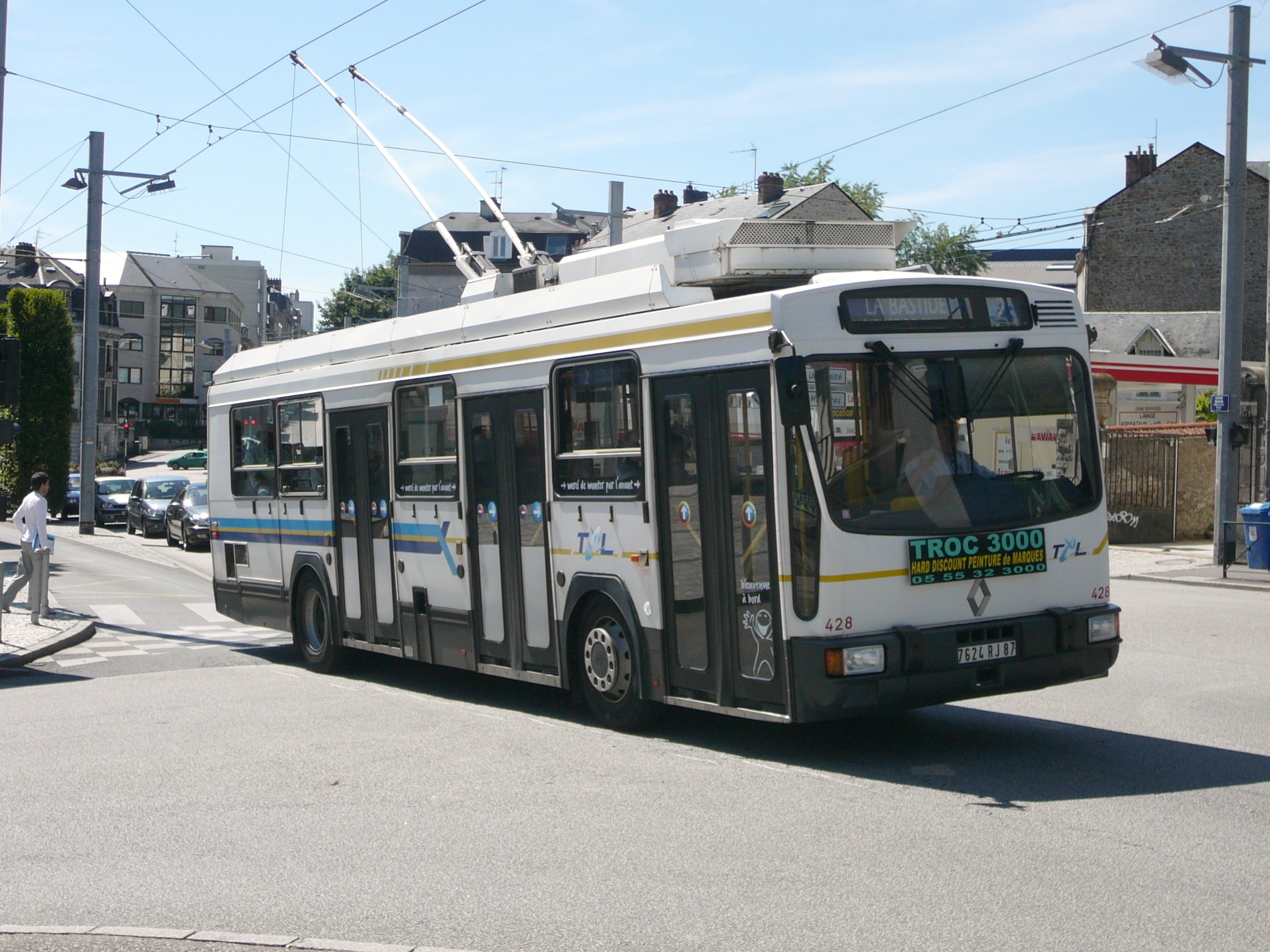 Trolleybus Renault ER100 2H de la ligne 2 à l'arrêt Hôtel de Ville